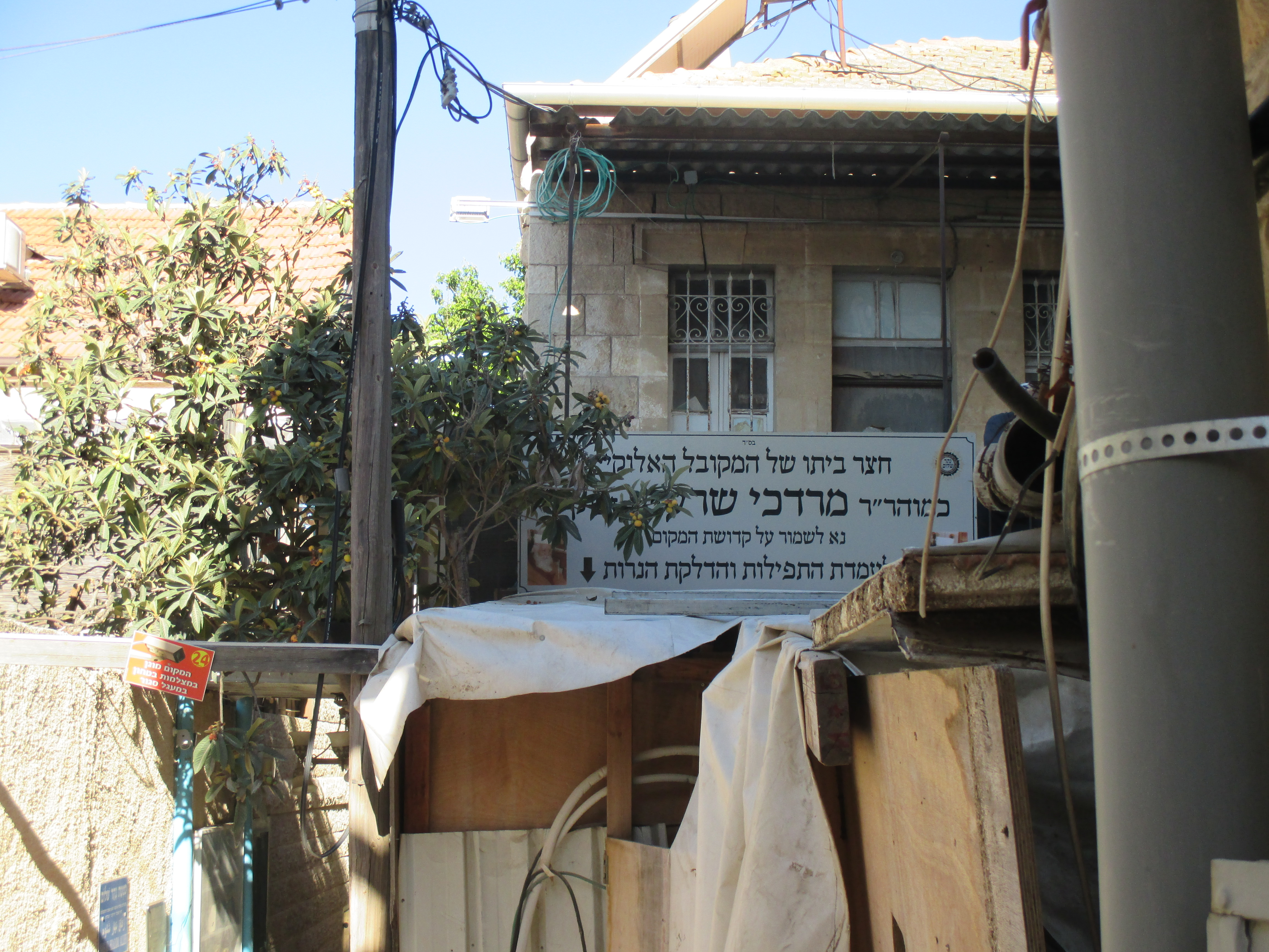 חצר בית הרב מרדכי שרעבי (2019)